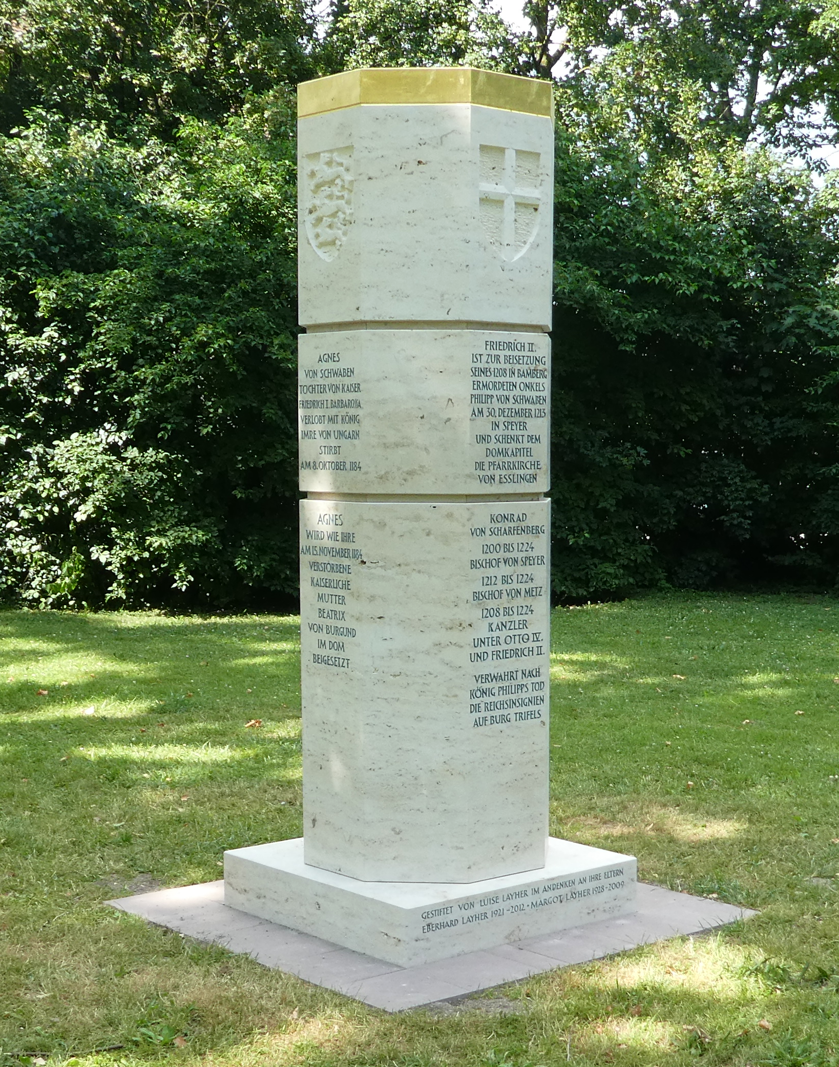 Stauferstele beim Dom zu Speyer mit Inschrift zu Agnes von Staufen